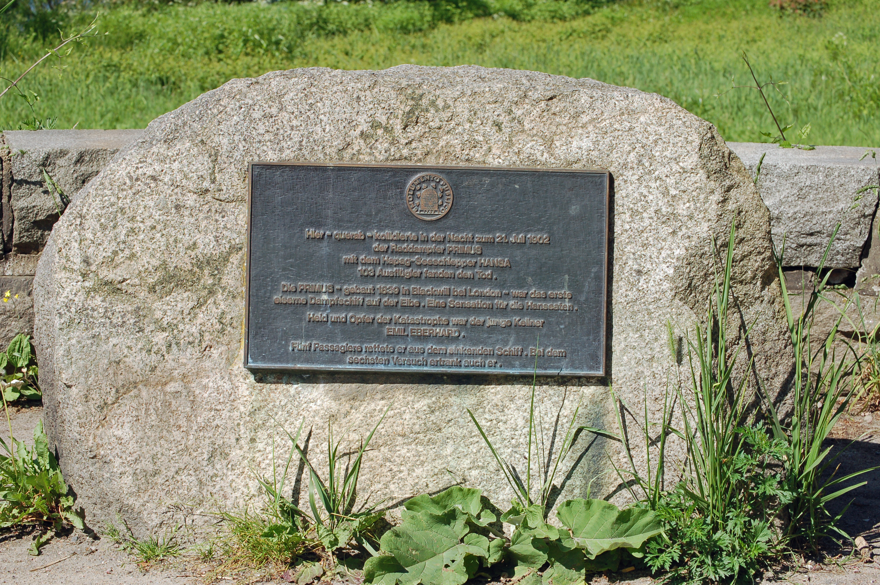 Der Gedenkstein an das Schiffsunglück der Primus auf der Elbe im Jahr 1902